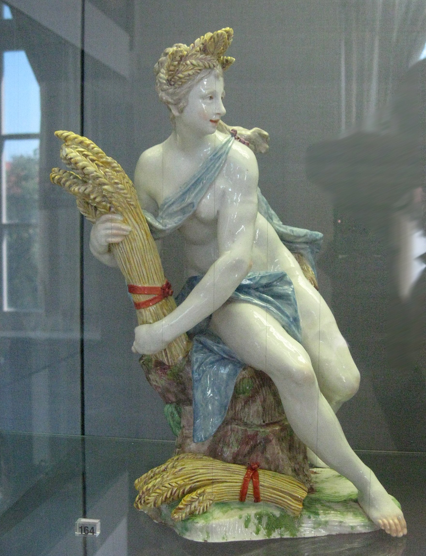 Dominikus Auliczek: Ceres, Nymphenburger Porzellanmanufaktur, Porzellanmuseum München